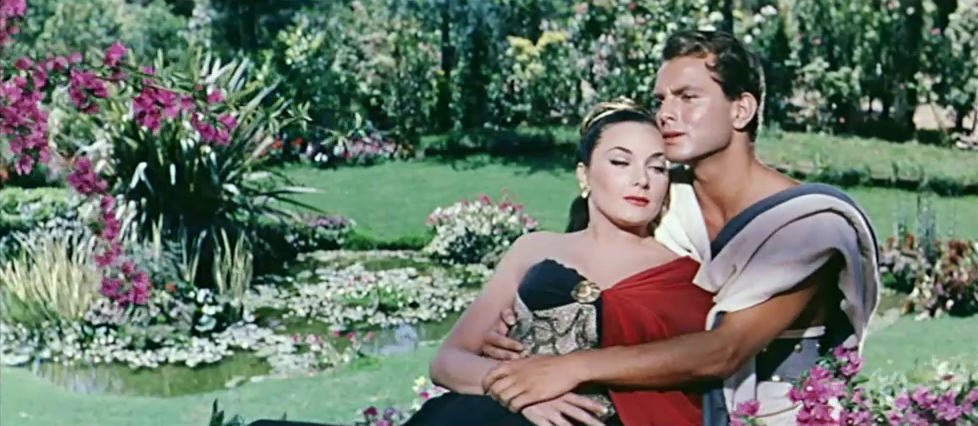 Scena del film Le fatiche di Ercole (1958)